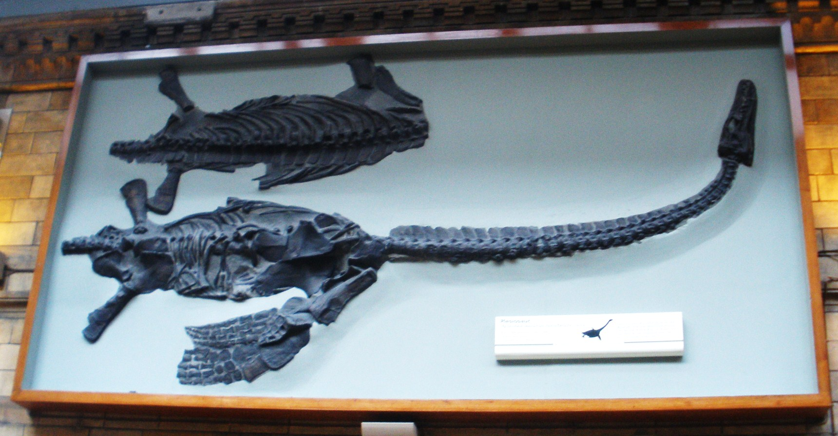 Fossil of Attenborosaurus, an extinct reptile-- Took the photo at Natural History Museum, London